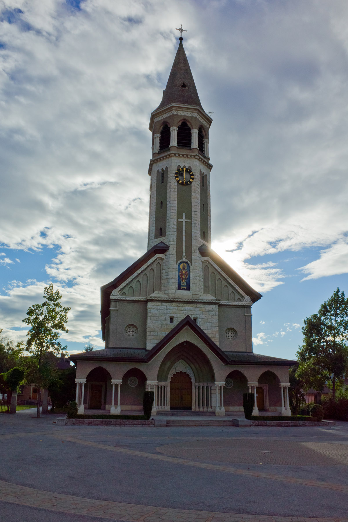 Eglise Saint-Urbain, Chippis